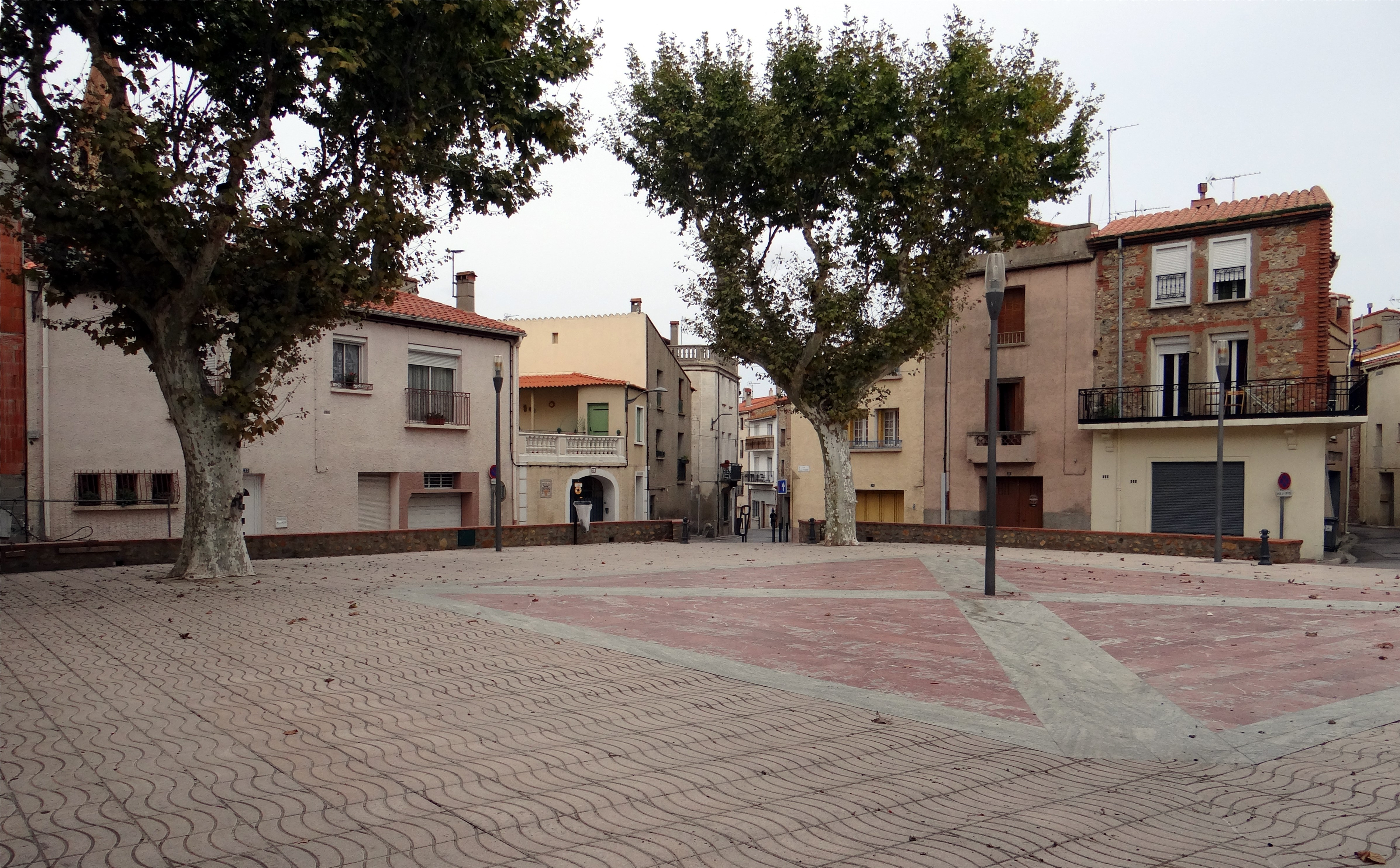 Placa Nova (Place de la République rénovée en 1987), Pia, Pyrénées-Orientales, France.